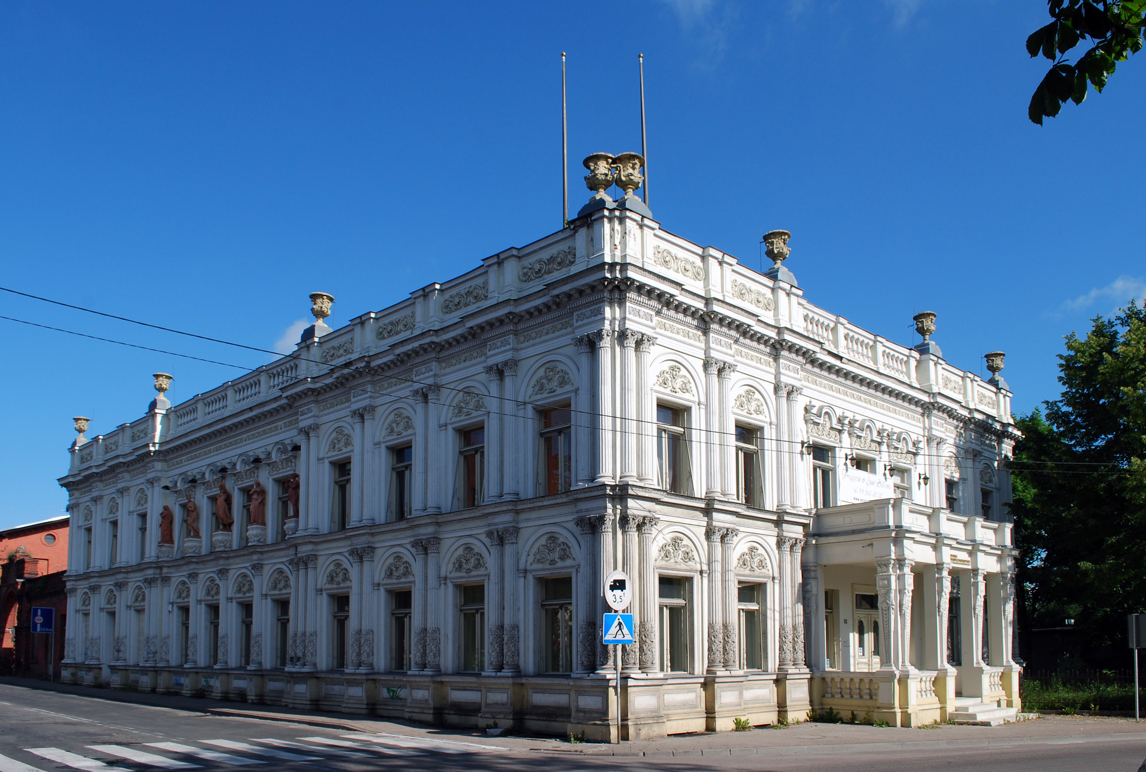 Pałac Wiechertów w Starogardzie Gdańskim.